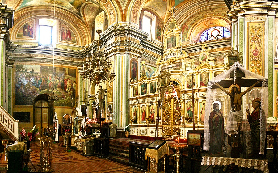 Іконостас і вівтар